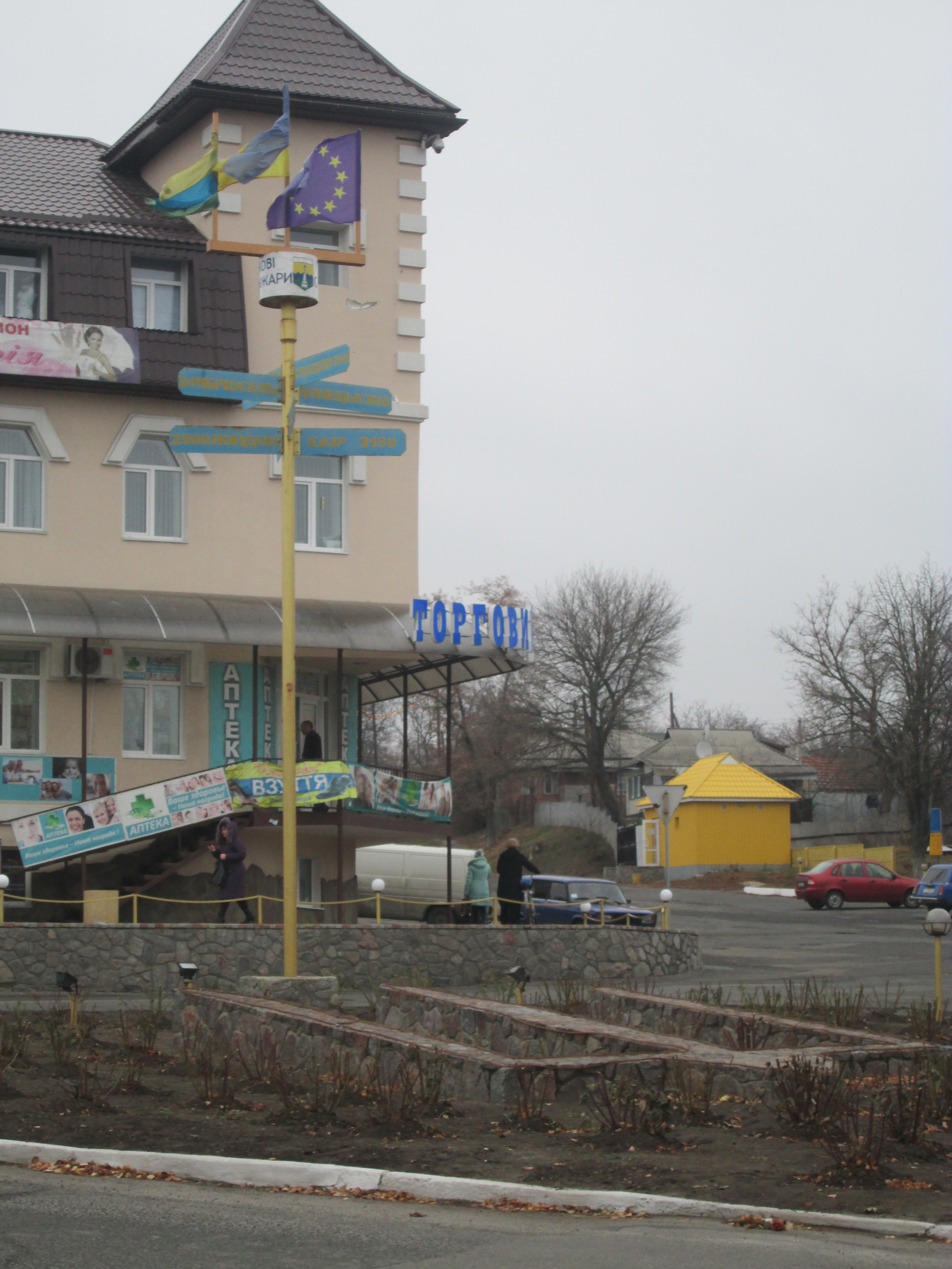 Центр